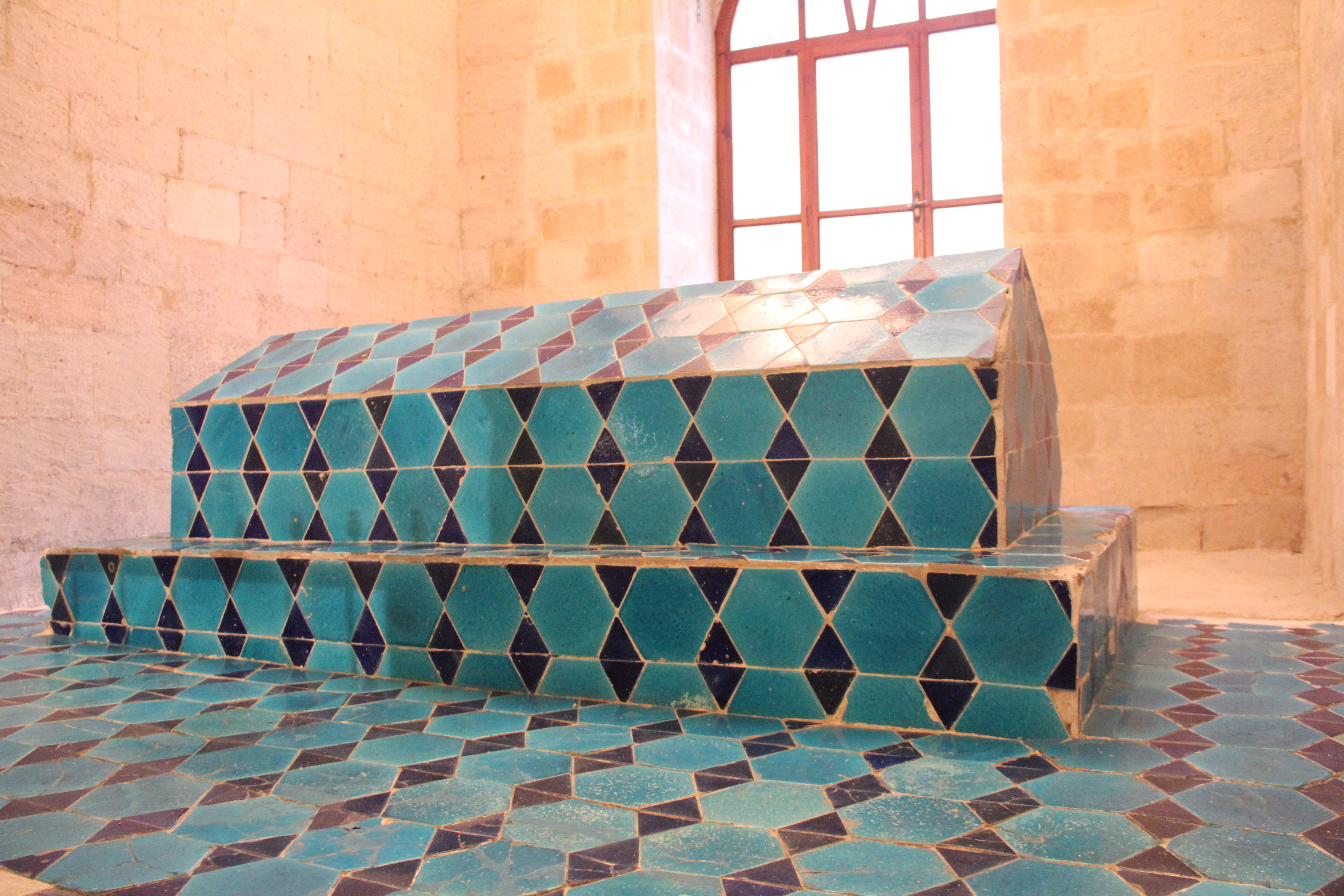 Yakup Bey mezarı, Kütahya.